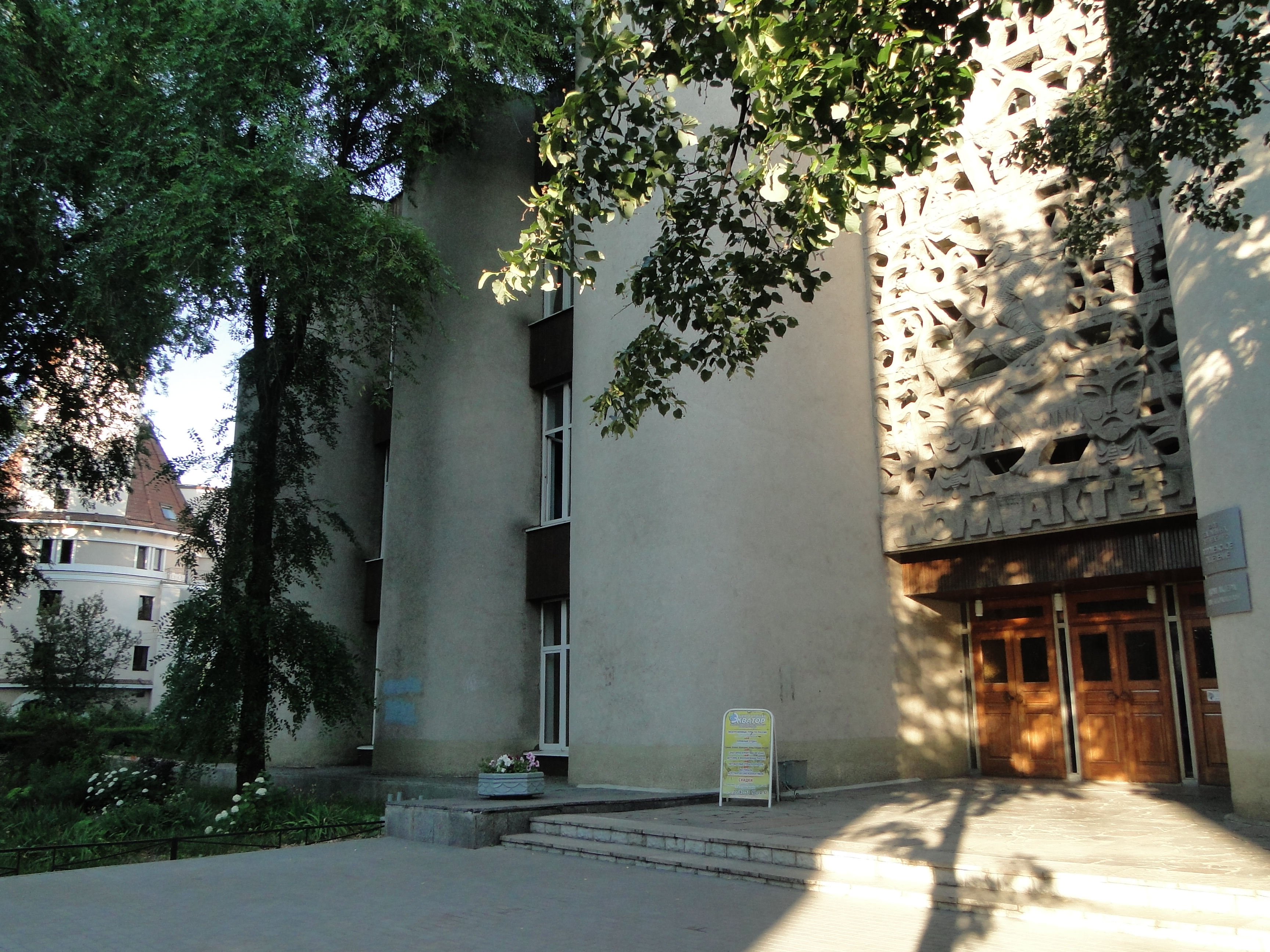 Дом актера